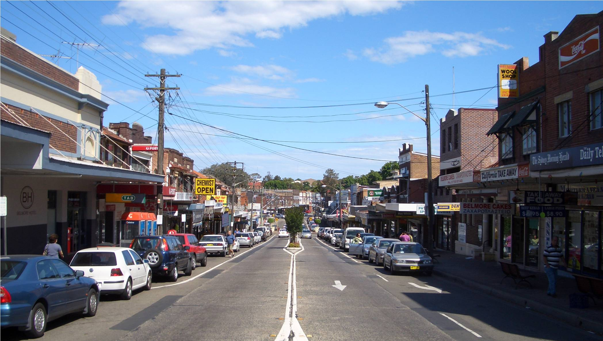 Belmore